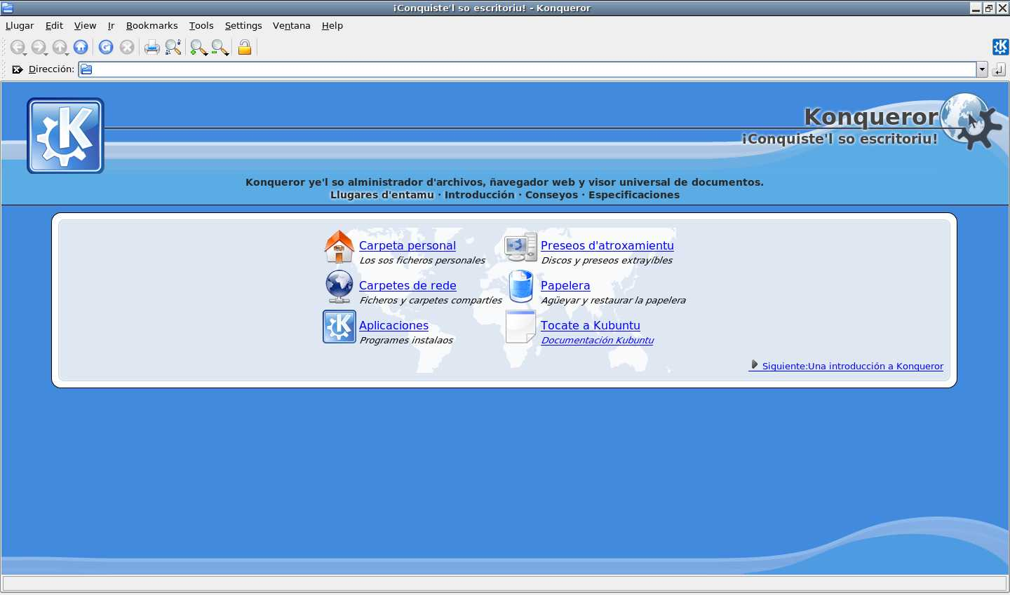 Captura de pantalla de konqueror